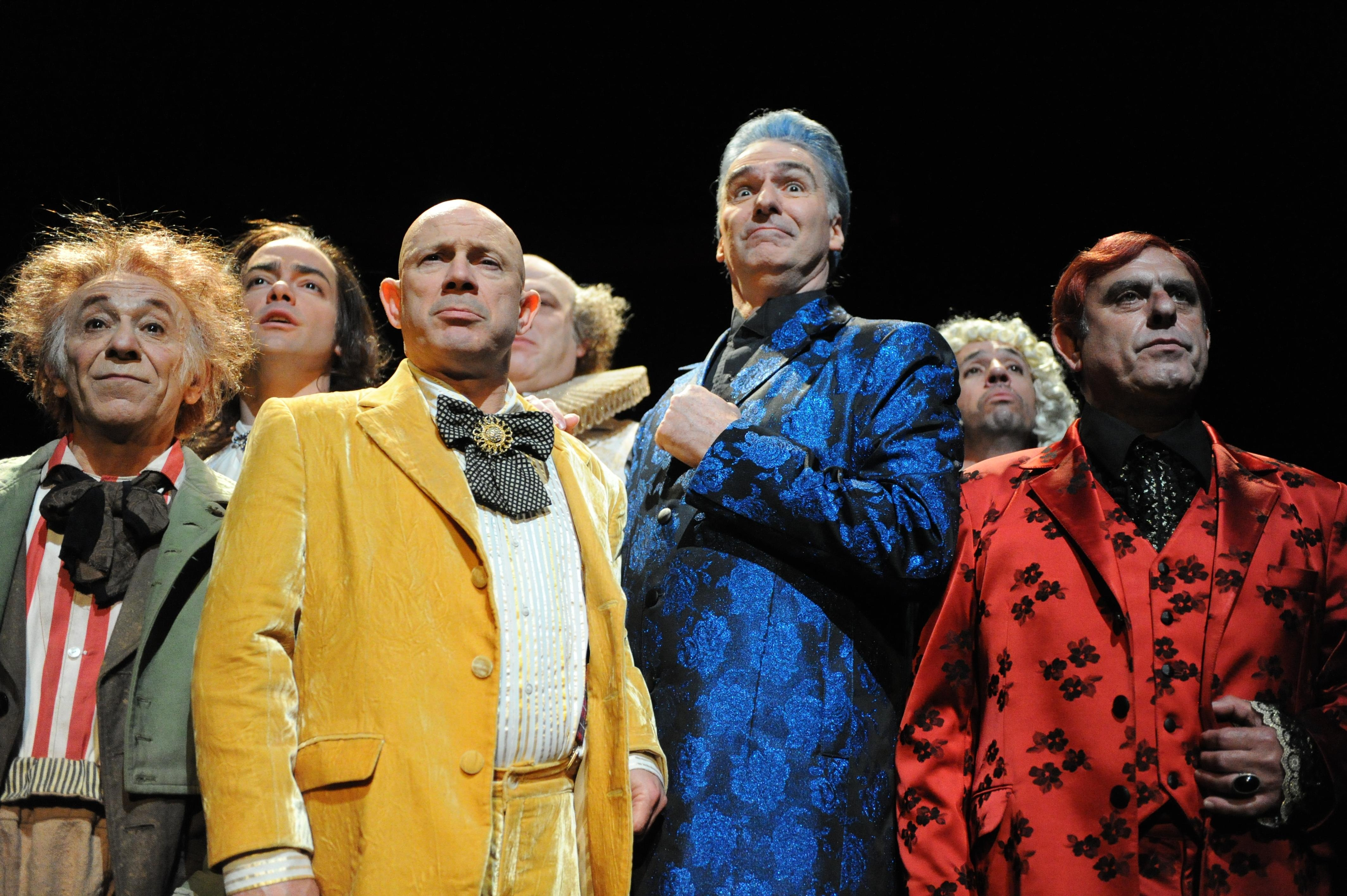 בית ספר לנשים מאת מולייר, קופרודוקציה של הקאמרי וחיפה, בבימויו של אודי בן-משה, 2012